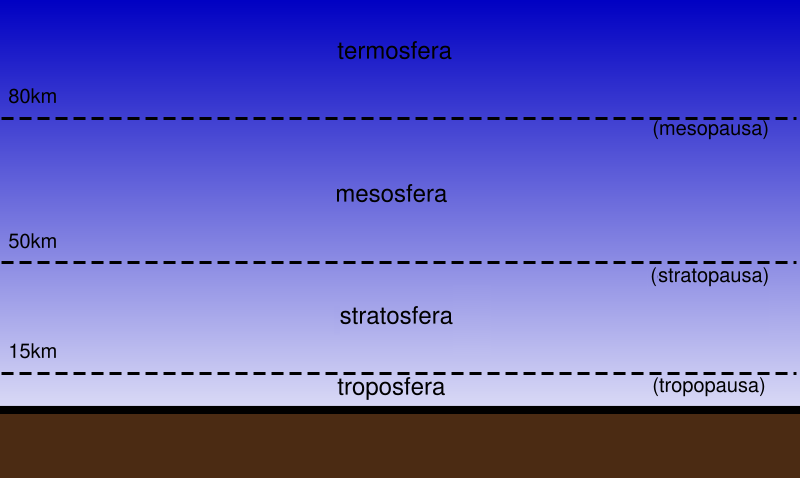 strati atmosfera